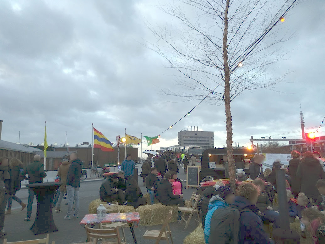 Busbrugfestival in Zwolle, de opgestelde historische bussen en busbrug zelf is te zien. Ik heb alle gezichten gecensureerd voor de zekerheid